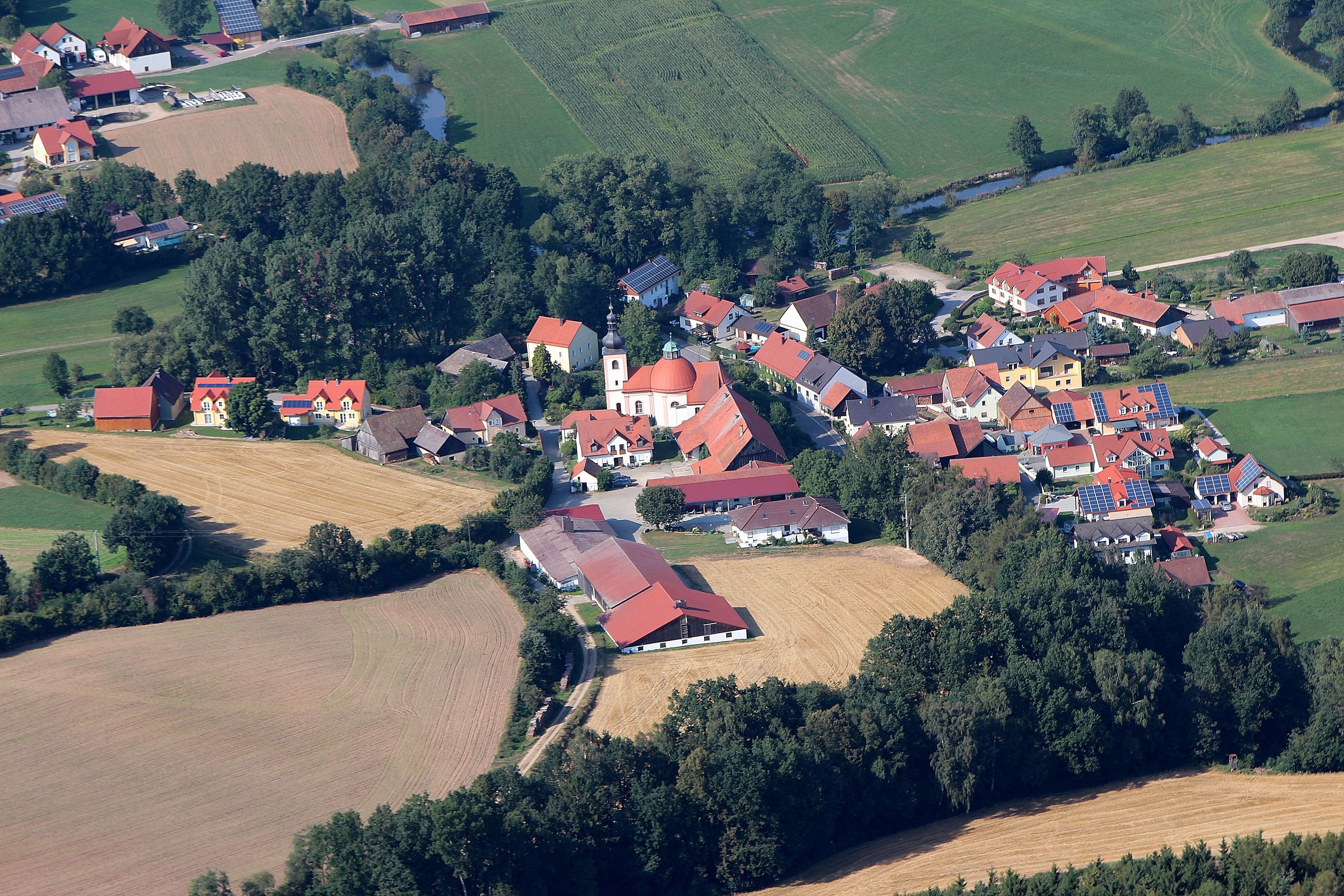 Katzdorf ist ein Ortsteil von Neunburg vorm Wald, Landkreis Schwandorf, Oberpfalz, Bayern